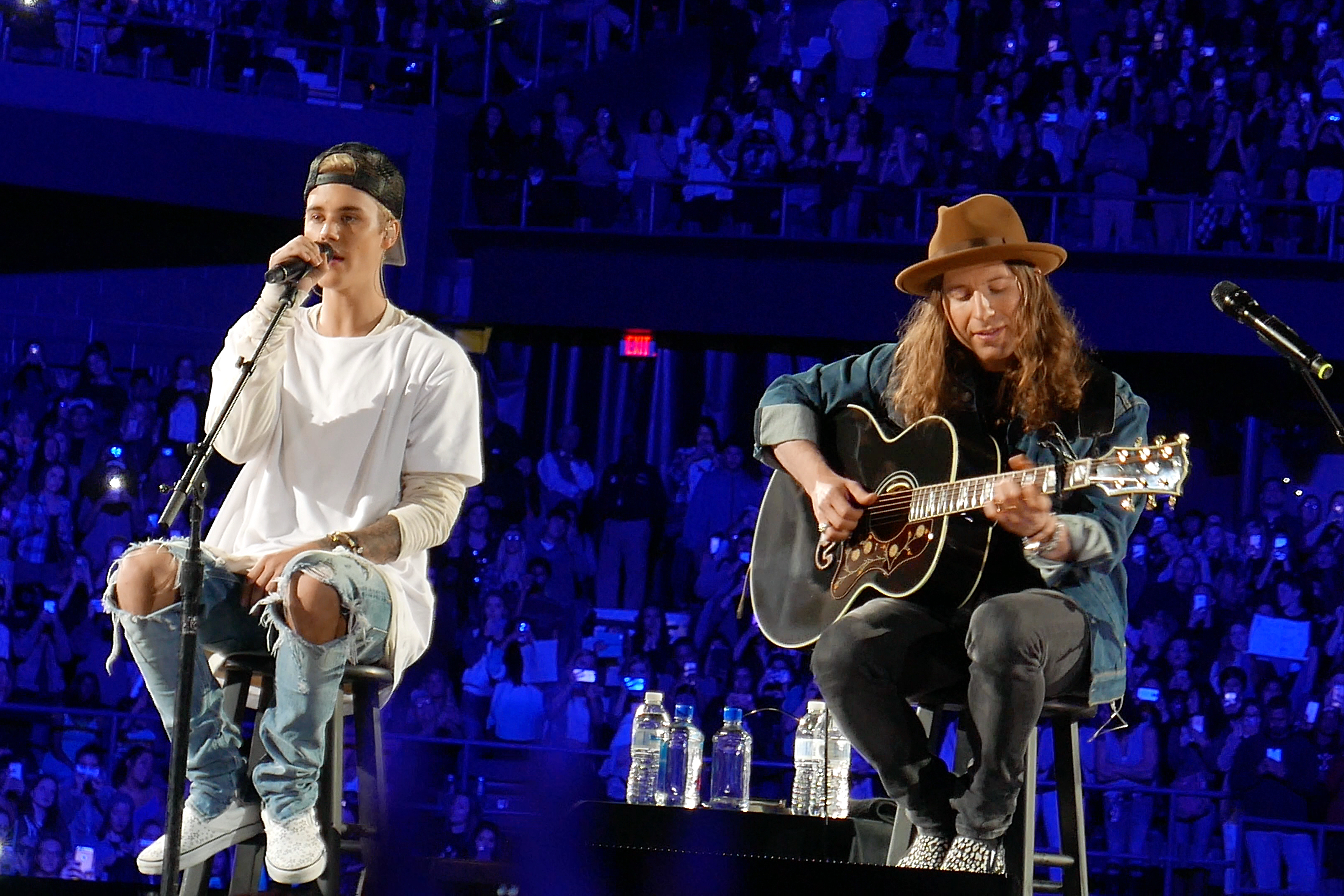 Justin Bieber durante un concierto en el Allstatae Arena en Rosemont, Illinois (2015)